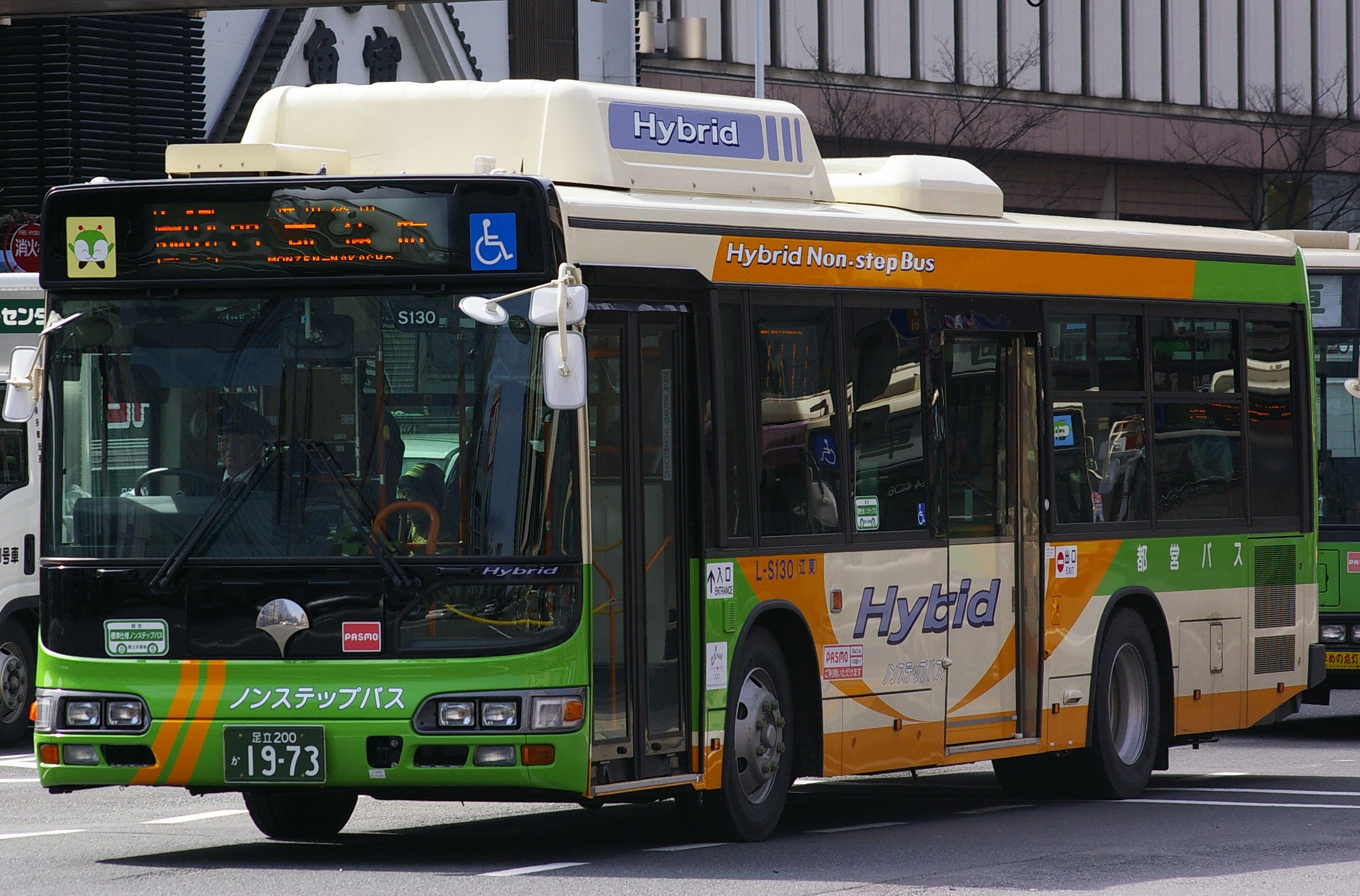 日野＋J-BUS ハイブリッドノンステップバス BJG-HU8JLFP